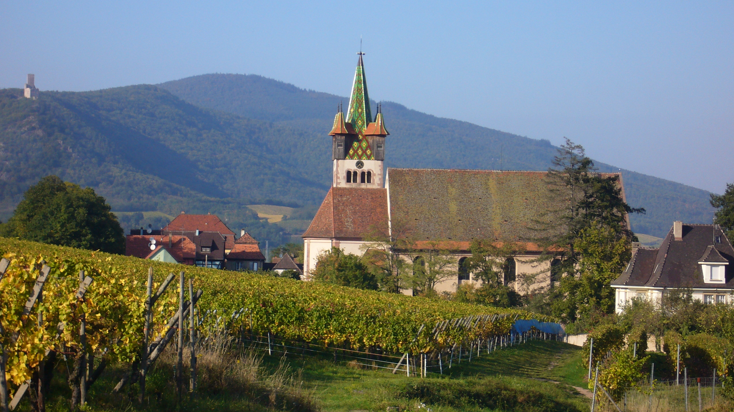 Eglise Saint-Georges de Châtenois